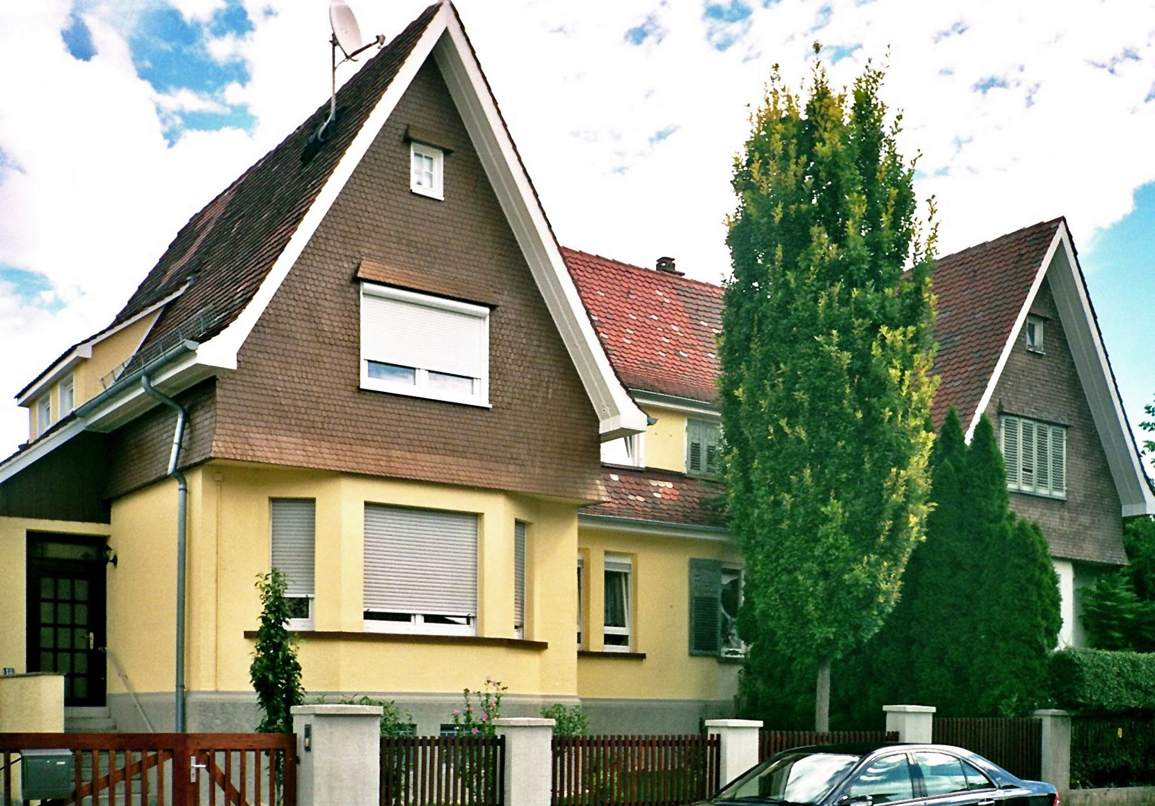 Hn-liebigstr16-18 Variante 1.JPG